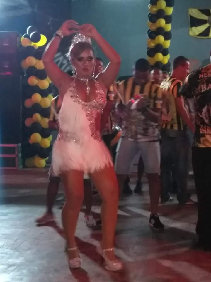 Vânia Falcão, rainha de bateria da Pérola do Samba.